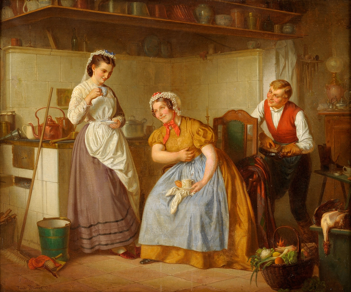 Eine lustige Geschichte. Signiert. Öl auf Leinwand, 68 x 82 cm